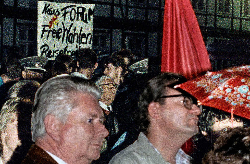 Am 23. Oktober 1989 rief das Neue Forum in Schwerin zu einer Demonstration auf. Die Demonstrationen des Neues Forums leiteten das Ende der DDR ein.